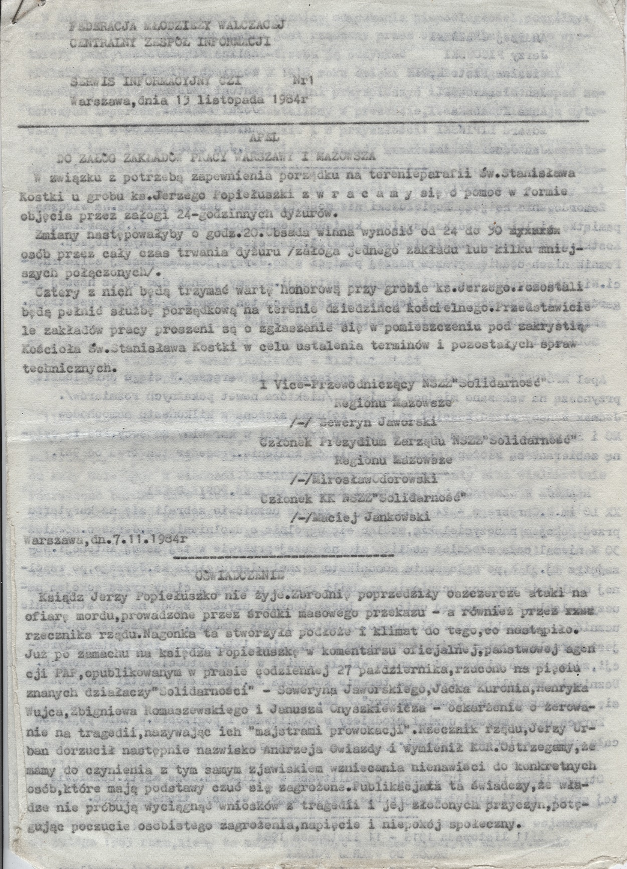 Polskie podziemne pismo młodzieżowe. Było wydawane w Warszawie przez Federację Młodzieży Walczącej w latach 1984-1985